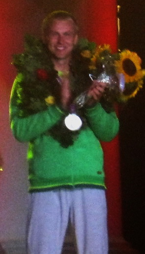 Jevgenij Shuklin